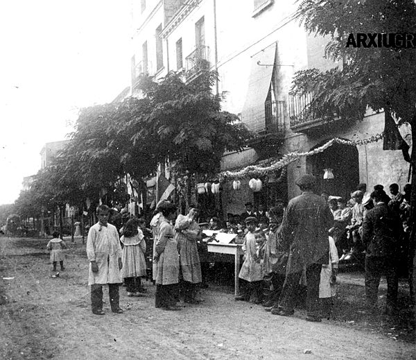 Un grup de nens vestits amb bata al carrer de Josep Anselm Clavé, durant la celebració de la Festa Major o d'un sant de barri. Al carrer hi ha garlandes i fanalets de paper penjats entre els arbres. Tomàs Torrabadella i Fortuny Ca. 1900-1912